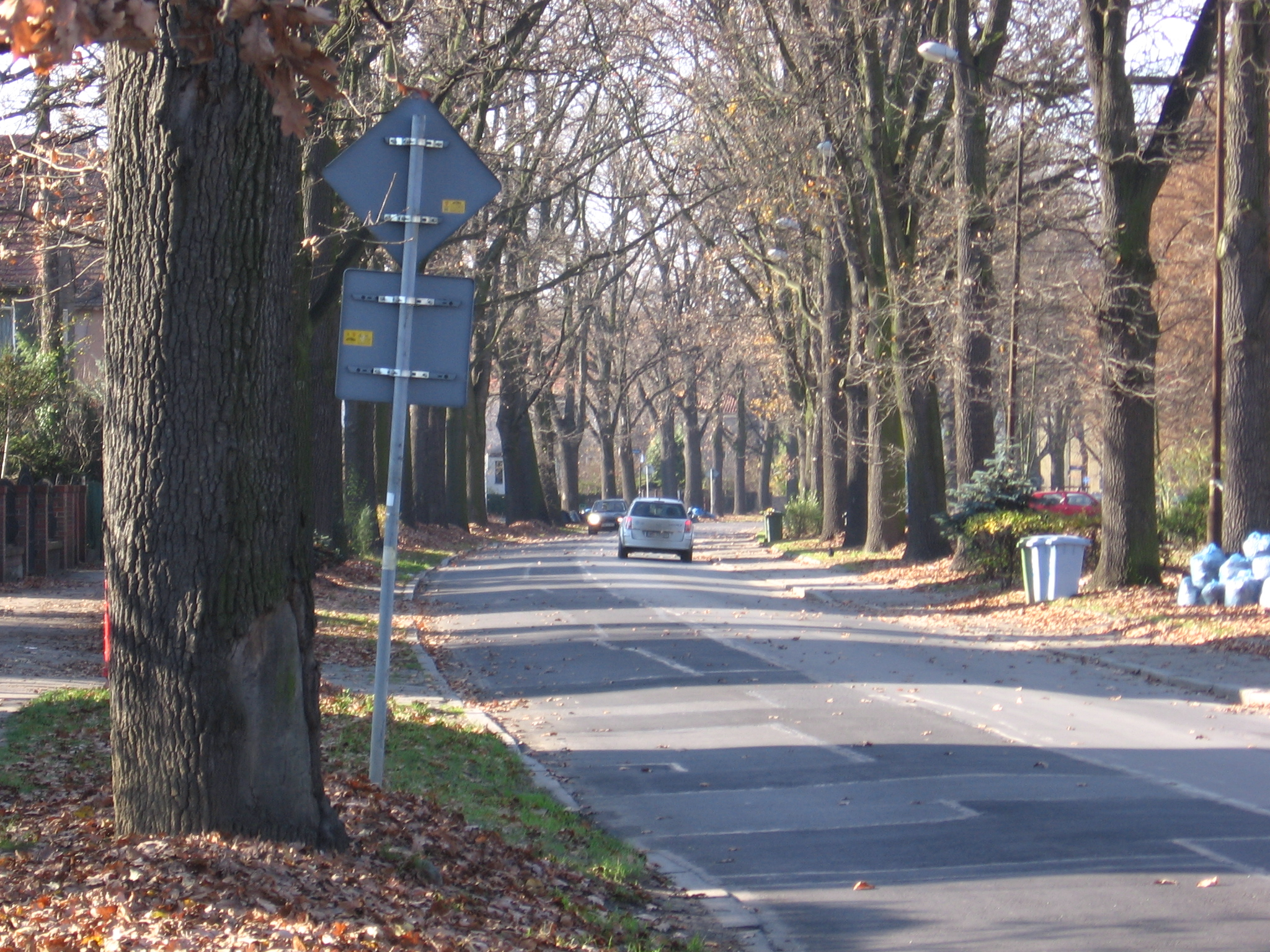 ulica Olszewskiego we Wrocławiu, widok z jej wschodniego końca (ze skrzyżowania z ul. Bacciarellego) w kierunku zachodnim